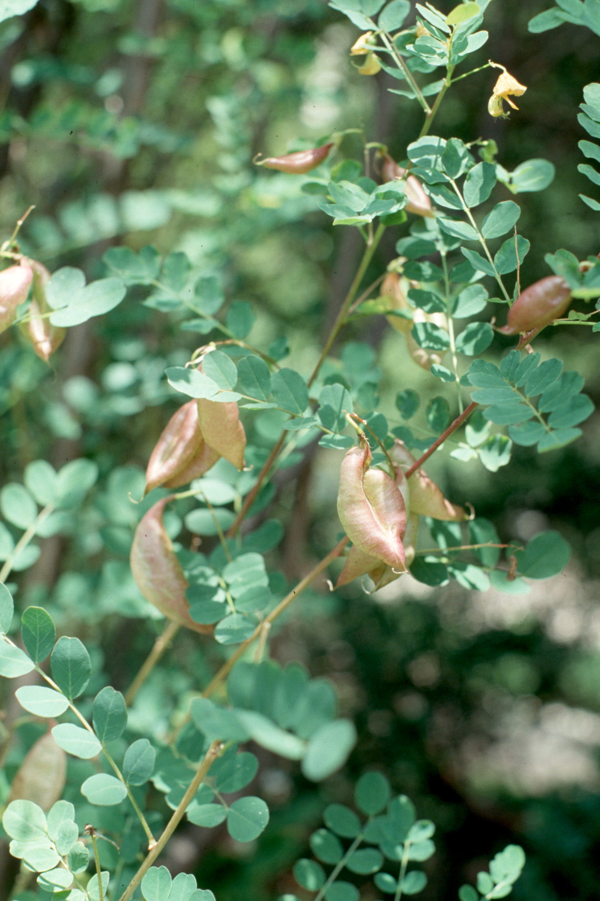 Colutea persica, frutos. Real Jardín Botánico, Madrid.